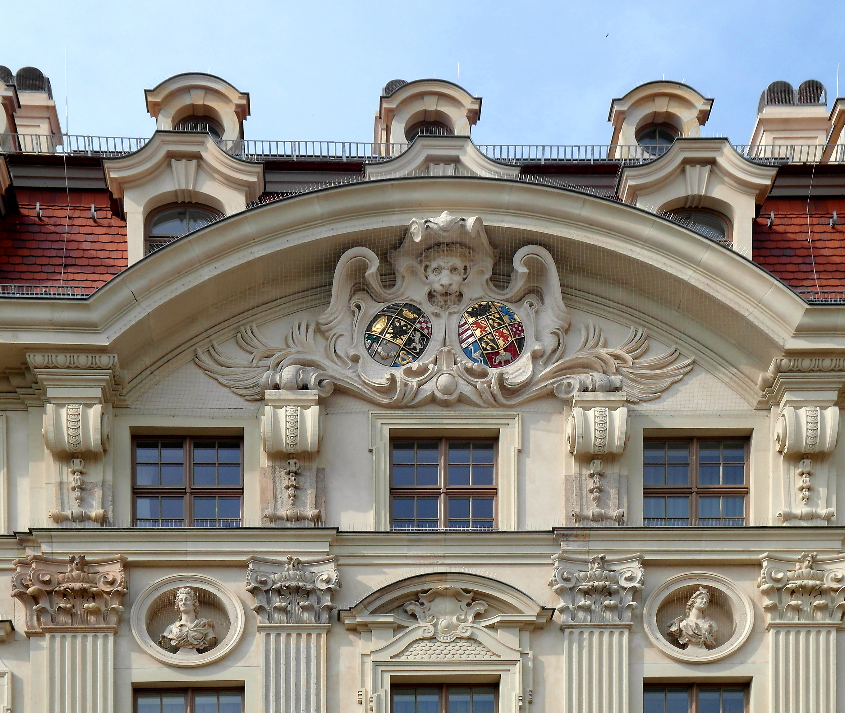 27.07.2014 01067 Dresden-Altstadt, Neumarktareal: Die Landhausstraße 6 ist das historische Palais Beichlingen (erbaut 1712-1715), ab 1855 "British Hotel". 2008-2010 wieder aufgebaut. Doppelwappen des Ludwig Gebhard Graf von Hoym (1678-1738) und seine Ehefrau Rahel Louise Gräfin von Werthern [SAM5202.JPG]20140727310DR.JPG(c)Blobelt